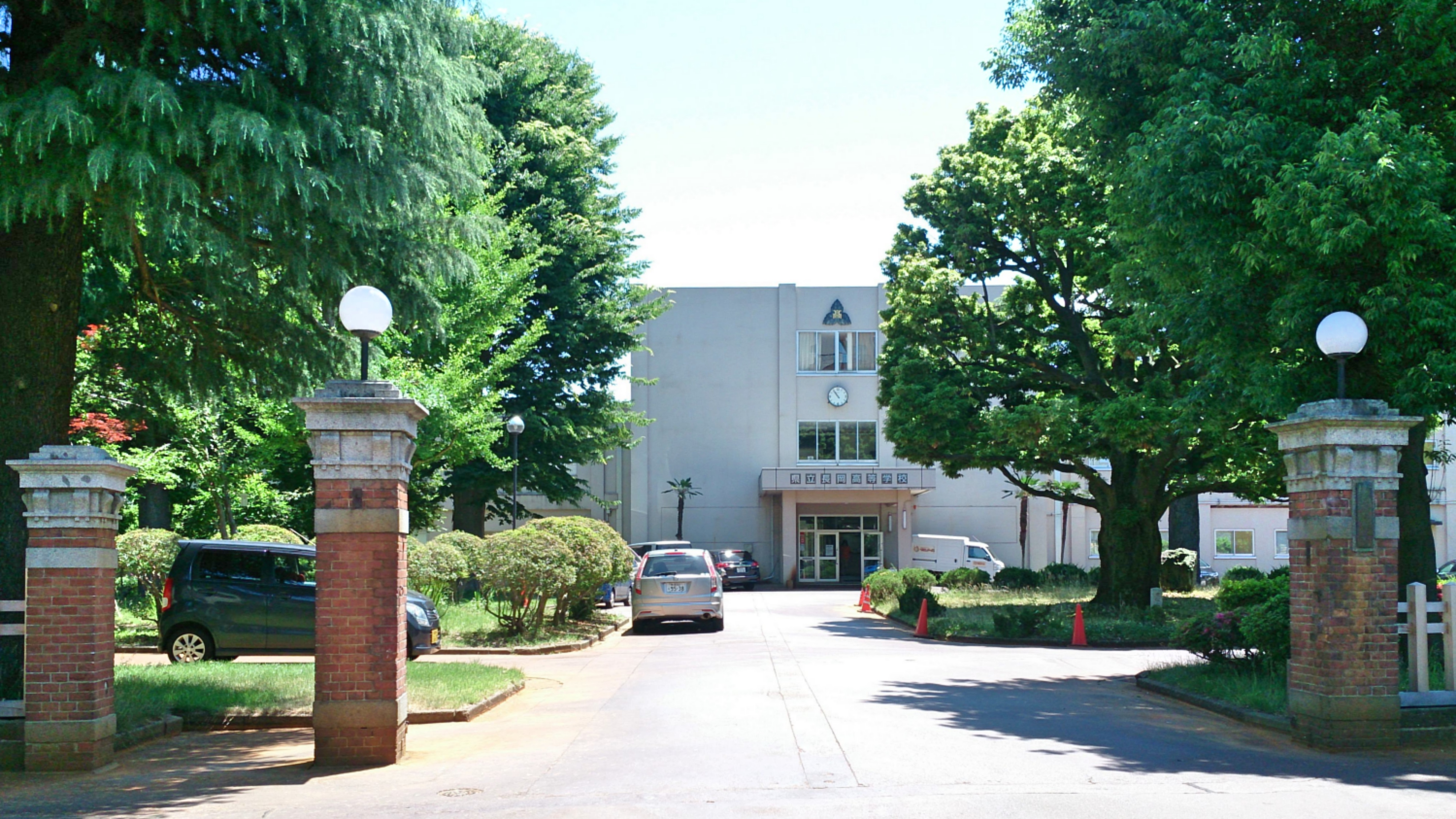 新潟県立長岡高等学校・正門